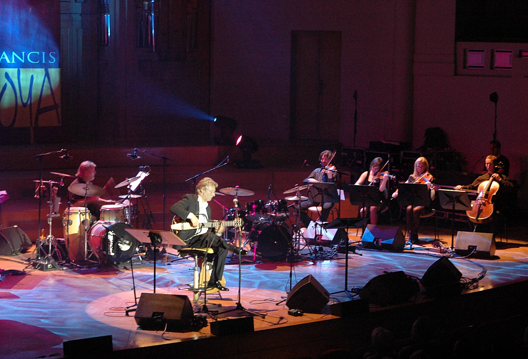 Francis Goya en concert en Belgique